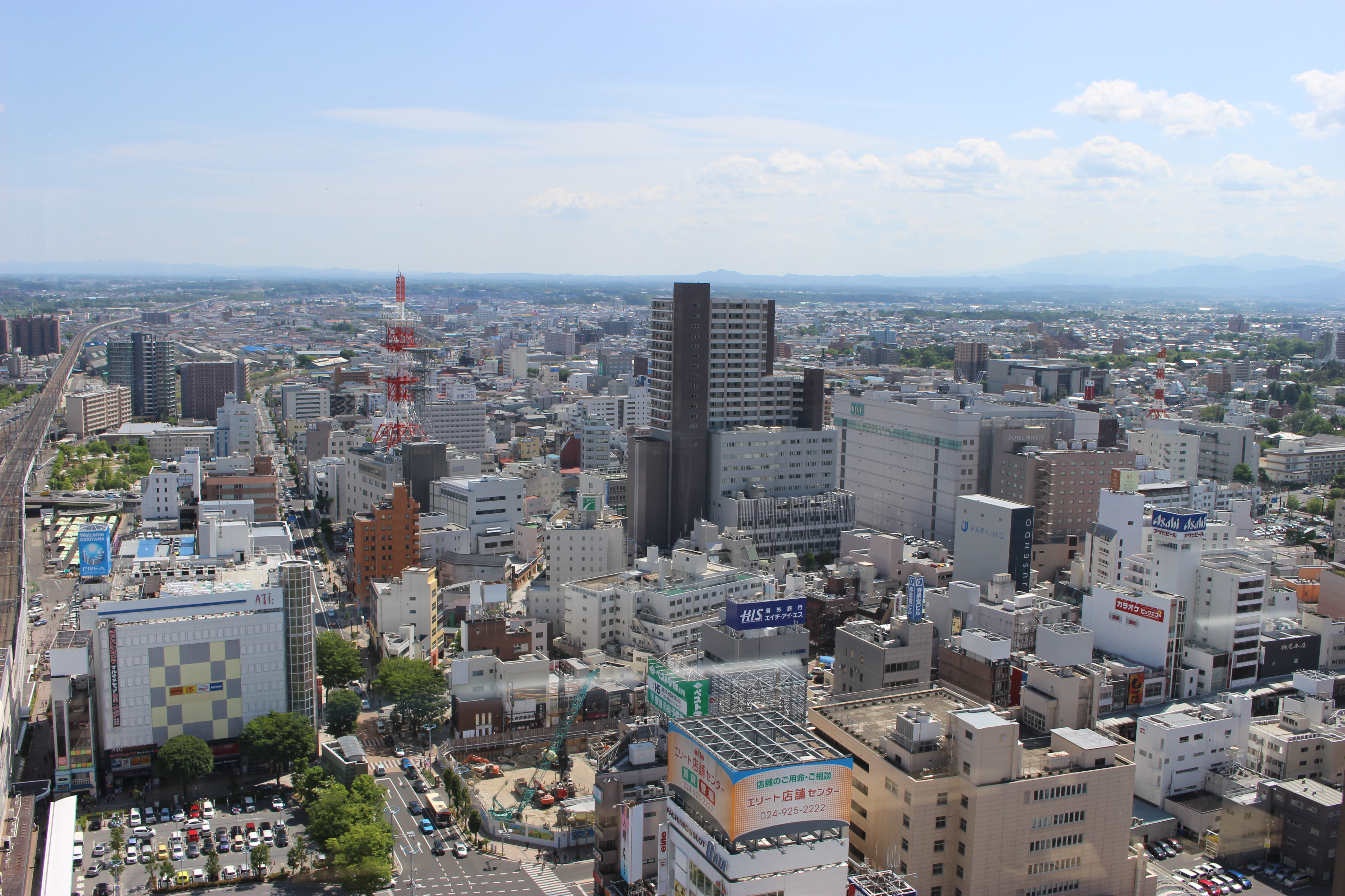 ビッグアイ展望ロビーからの眺め